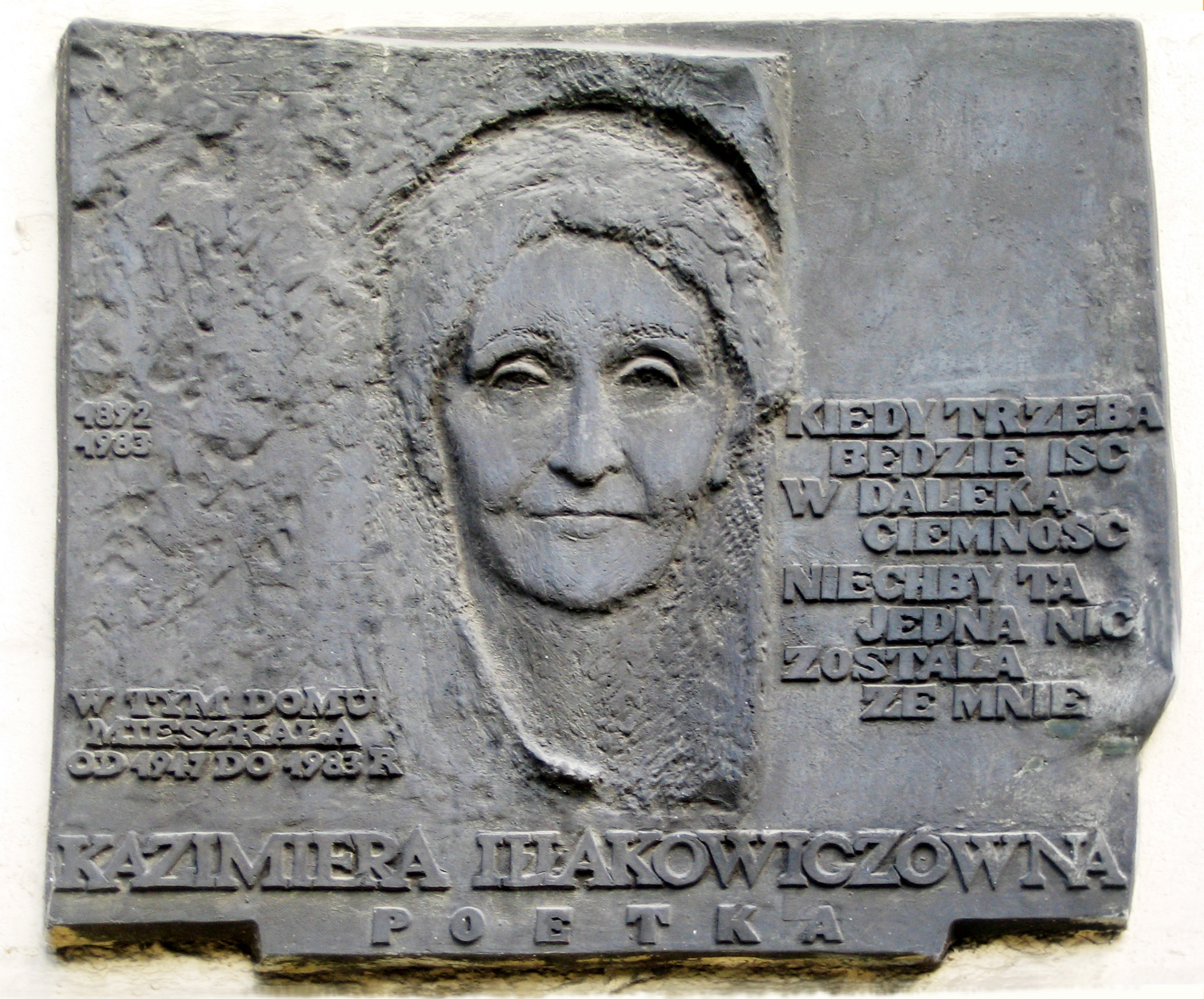 Tablica pamiątkowa Kazimery Iłłakowiczówny (Poznań ul.Gajowa 4)